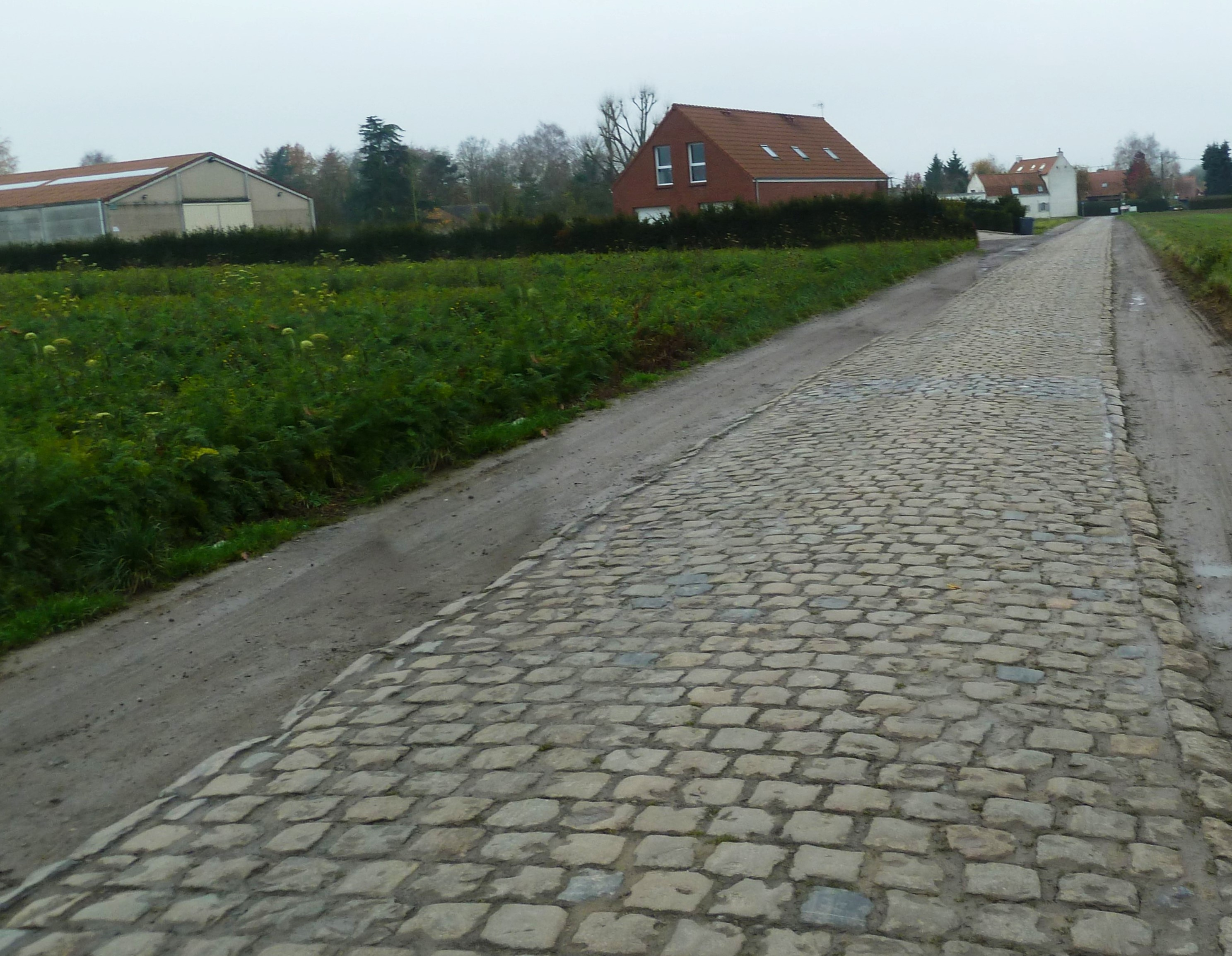 Le secteur pavé de Gruson, du Paris-Roubaix. à Gruson, Nord.- France.